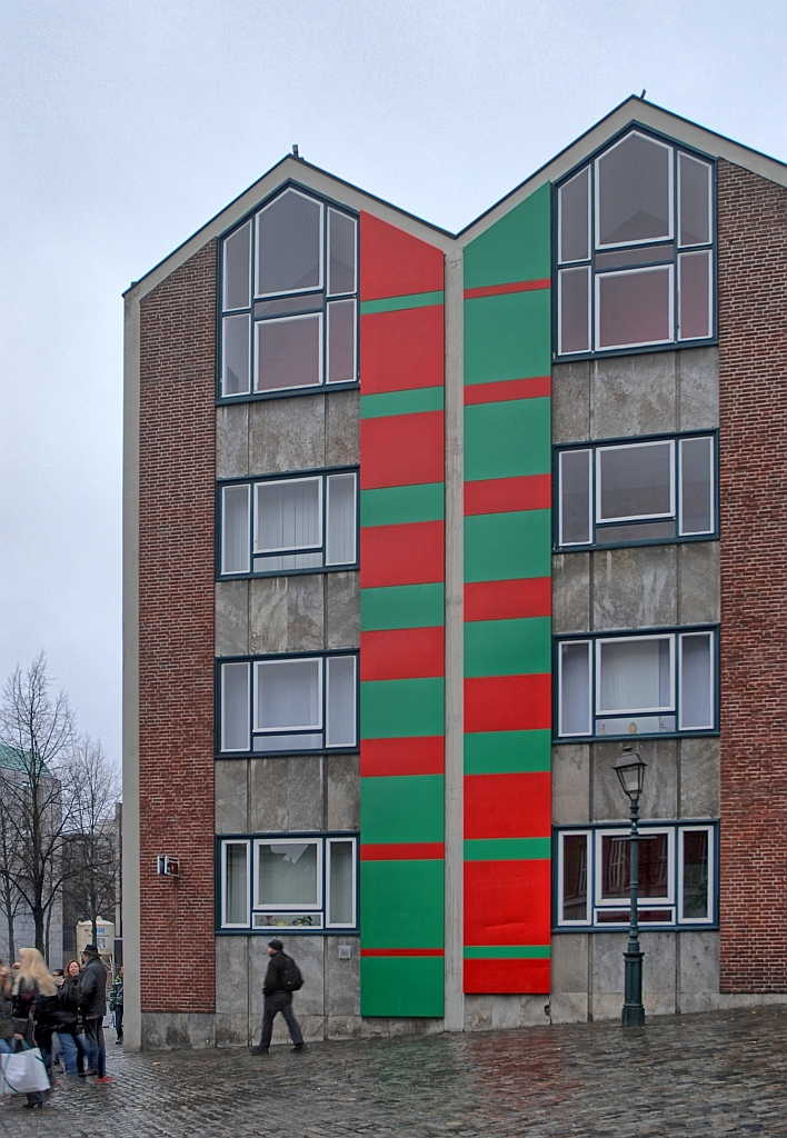 Peter Lacroix (* 1924 Aachen † 2010 ebd.): Farbleiter (1972) Für eine Open-Air-Ausstellung 1973 realisierte Lacroix am Standesamt Aachen die später wieder abgebaute "Farbleiter". Durch Engagement und Spenden vorwiegend aus der Bürgerschaft konnte die "Farbleiter" 2010 - kurz nach dem Tod des Künstlers - nach seinen Entwürfen in dauerhaften Material rekonstruiert werden. Standort: Standesamt Aachen, Krämerstr. 2a [HDR aus 3 Freihand-Belichtungen, mit easyHDR generiert. Geshiftet mit DigitalFotoShifter von Heinig Frank.]